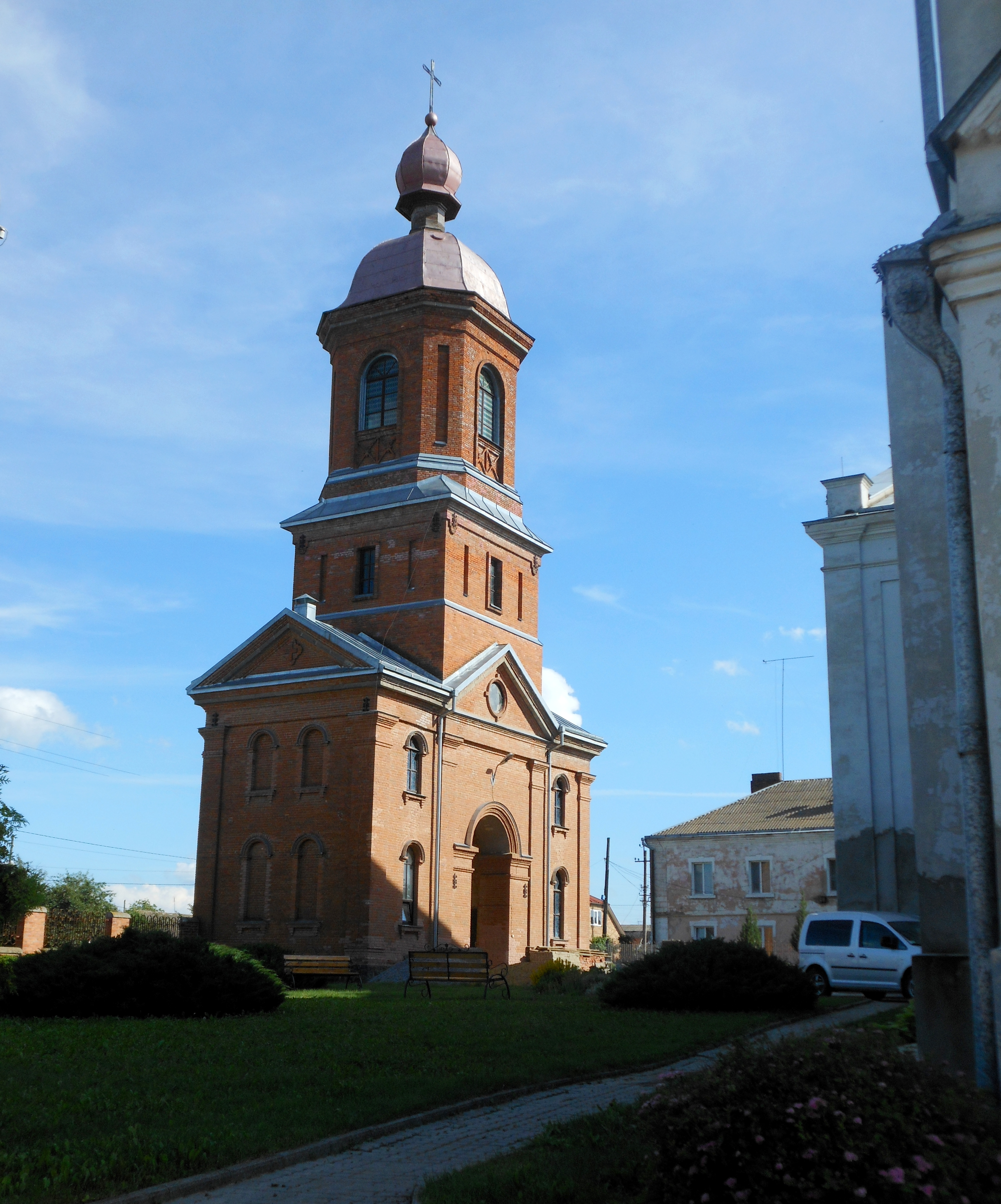 Дзвіниця Кармелітського монастиря, Бар, вул. Монастирська,55